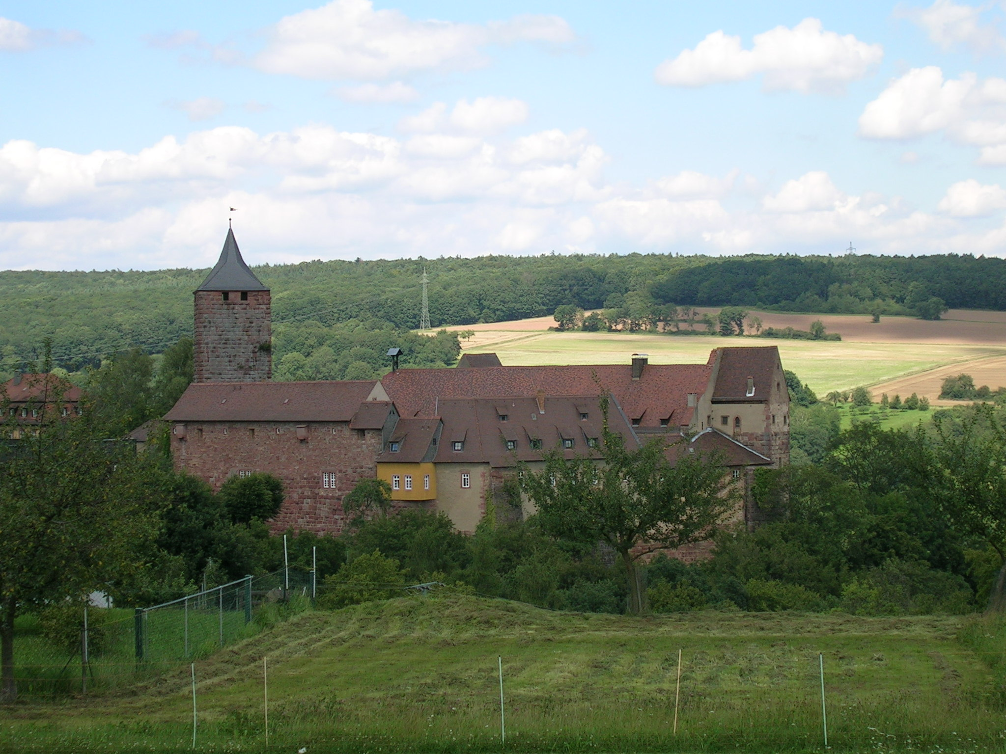 Burg Rothenfels circa von Ost oder Südost